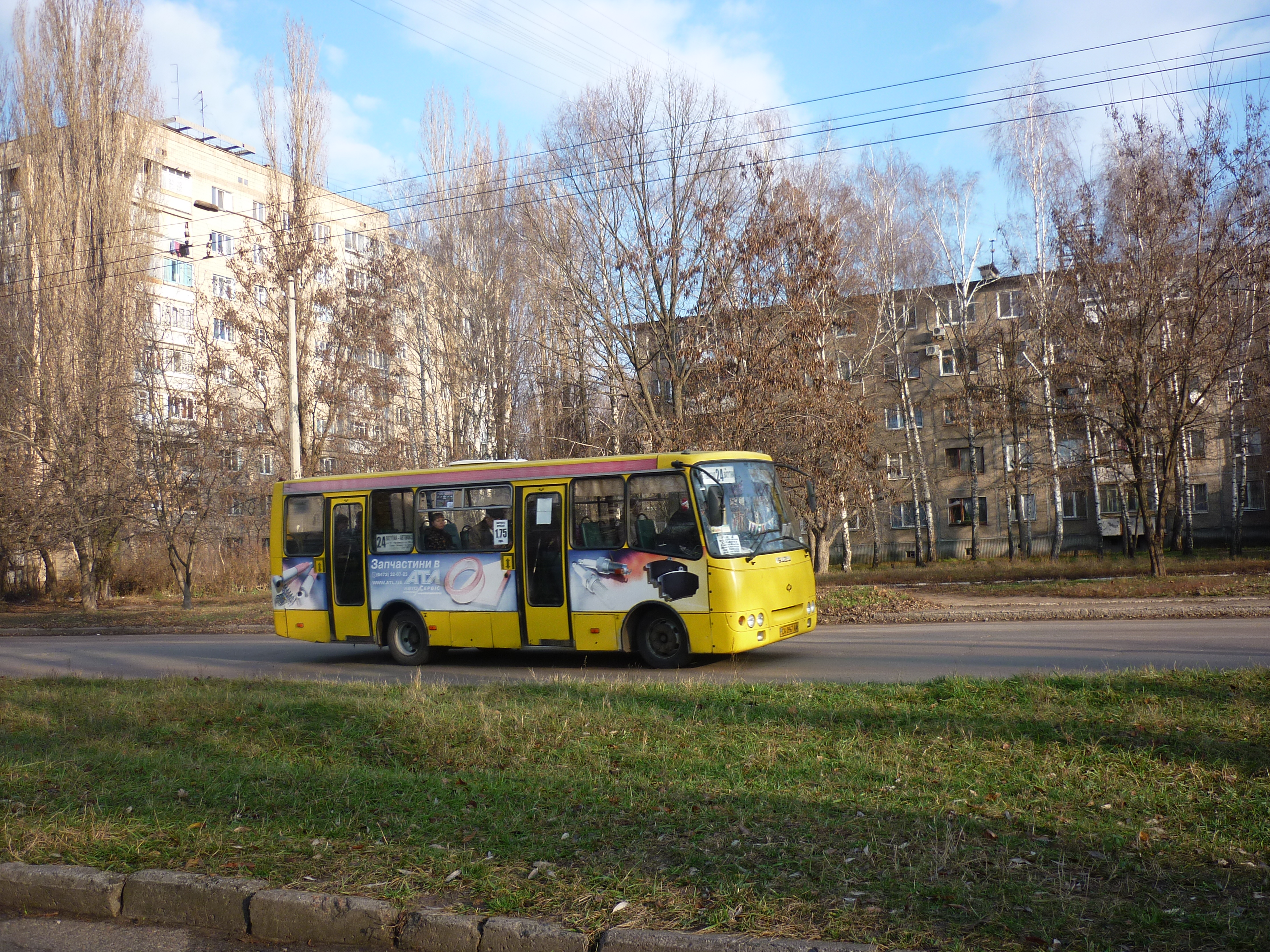 Автобус Богдан А092 в Черкасах (маршрут №24 по вулиці Ватутіна)